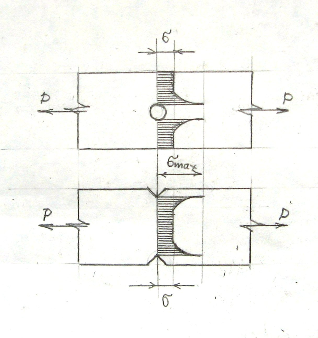 Spiętrzenie naprężeń